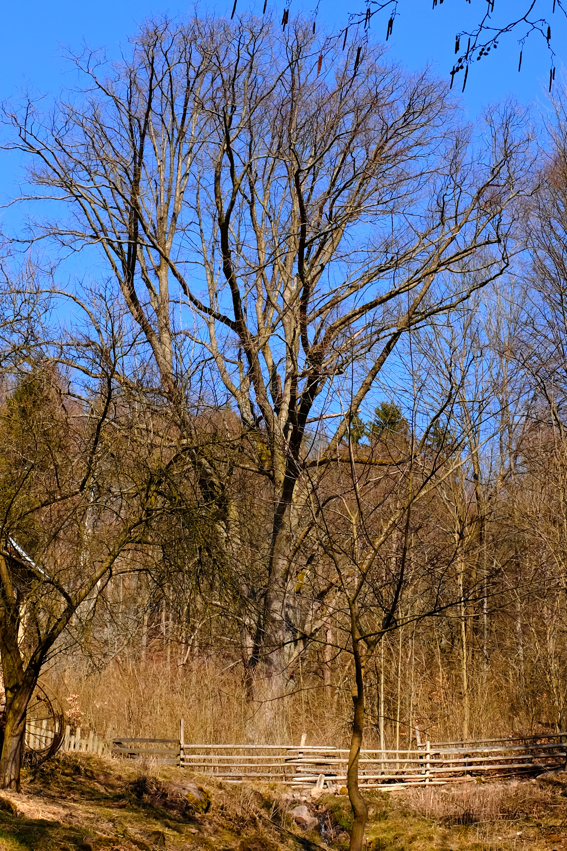 Památný strom - Pekelská lípa II. - Peklo, část obce Stráž nad Ohří, Doupovské hory, okres Karlovy Vary